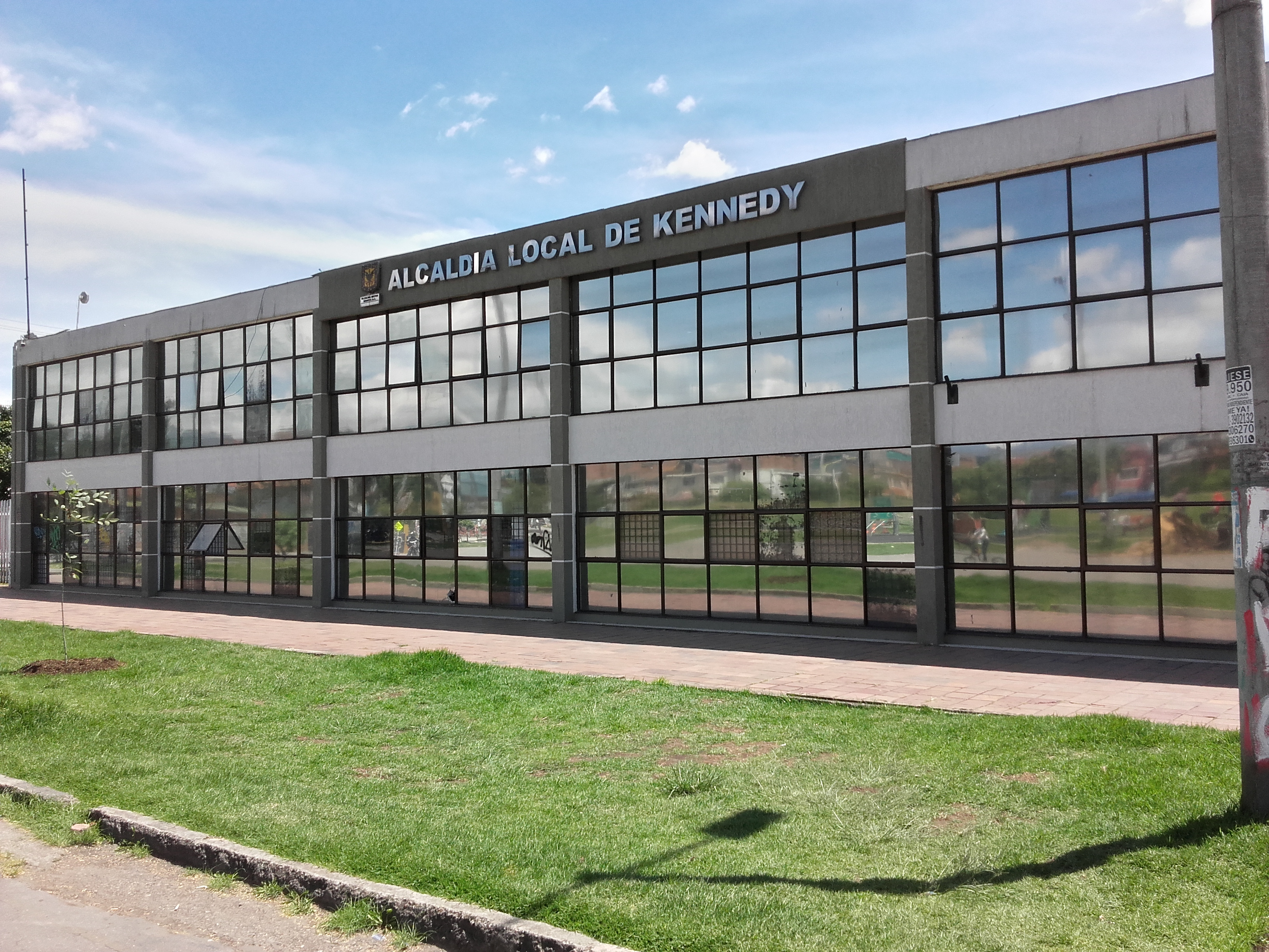 dnndnfnfldld